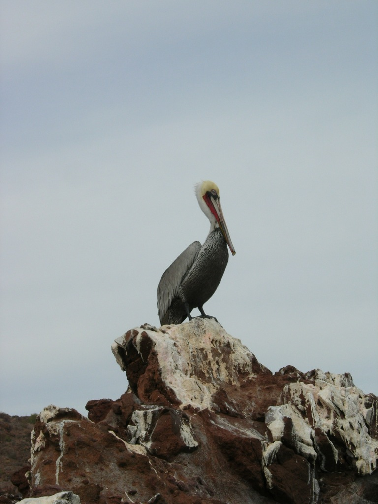 Un pelícano en la costa de El Vizcaíno Biosphere Reserva. En municipo de Mulegé, estado de Baja California Sur, México.